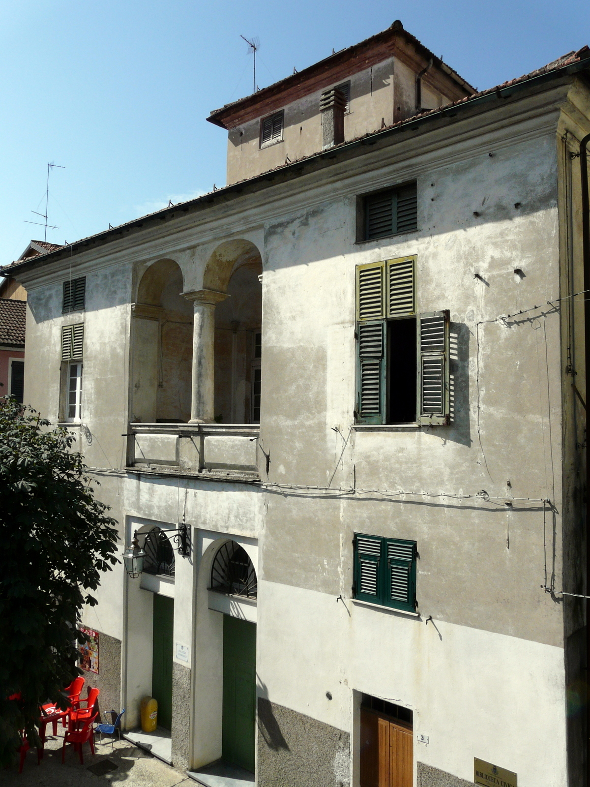 Palazzo dei Fieschi, Palazzo del Comune di Crocefieschi, Liguria, Italia